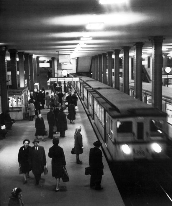 Zentralbild-Brüggmann Ga-Qu 1.2.1964 Berlin-Alexanderplatz Bahnsteig E, die unterste Etage des U-Bahnhofes Alexanderplatz. Von hier fahren die Züge in Richtung Lichtenberg und weiter nach Friedrichsfelde.